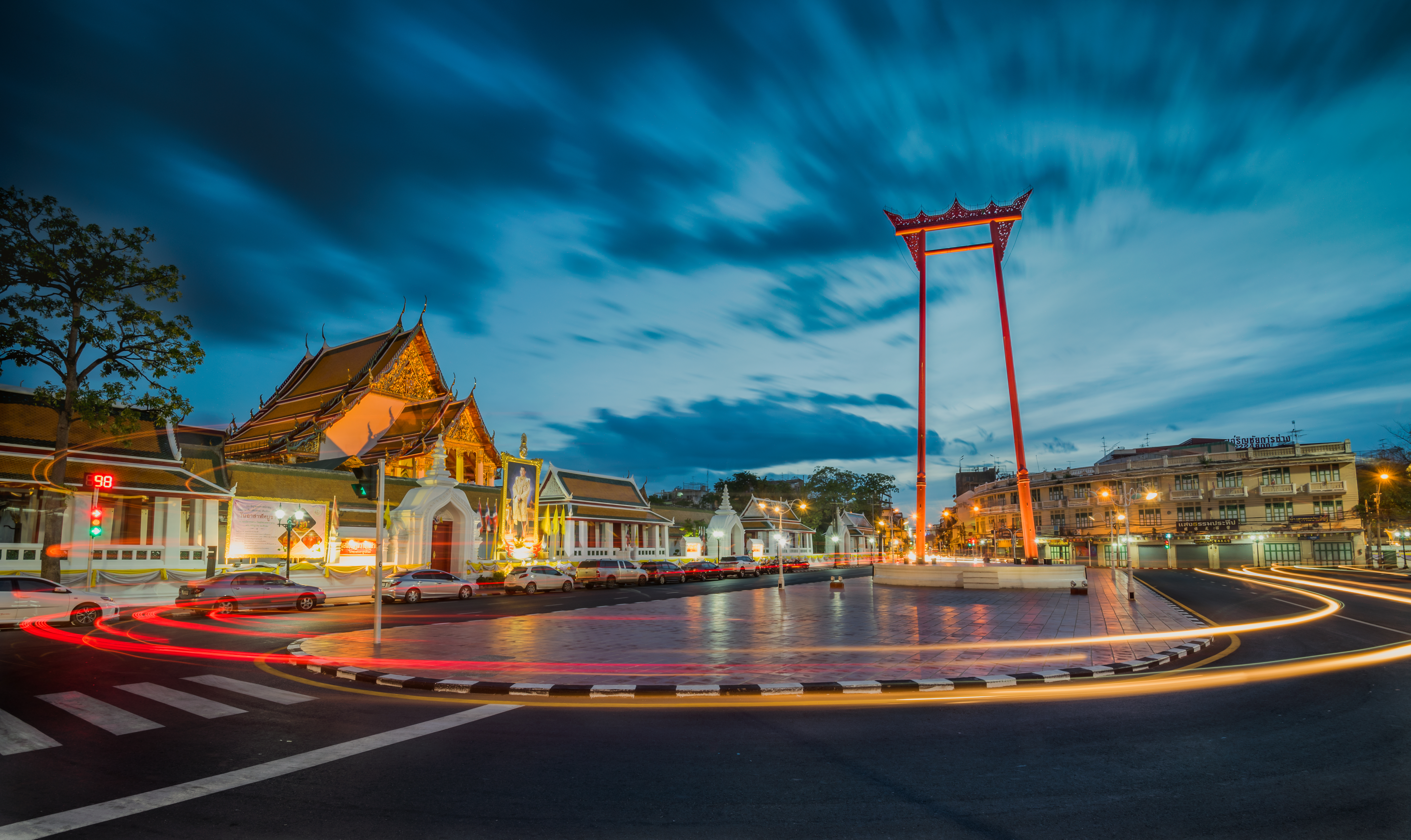 เสาชิงช้าและวัดสุทัศนเทพวราราม ในช่วงยามเย็น